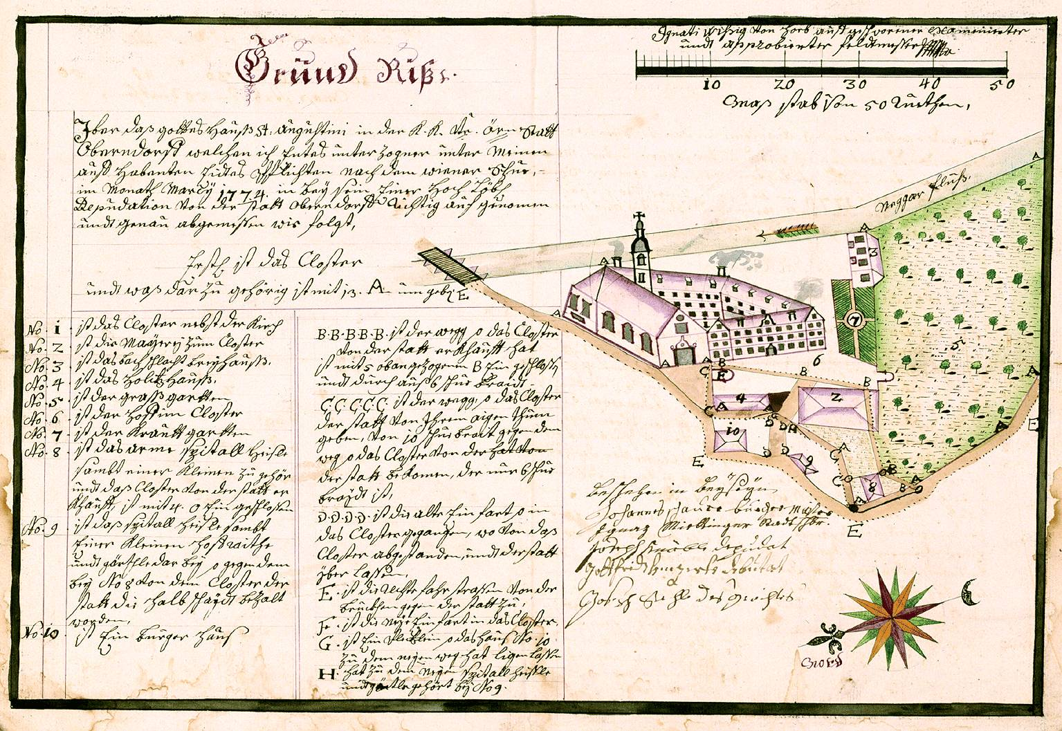 Augustinerkloster Oberndorf am Neckar im Jahre 1774